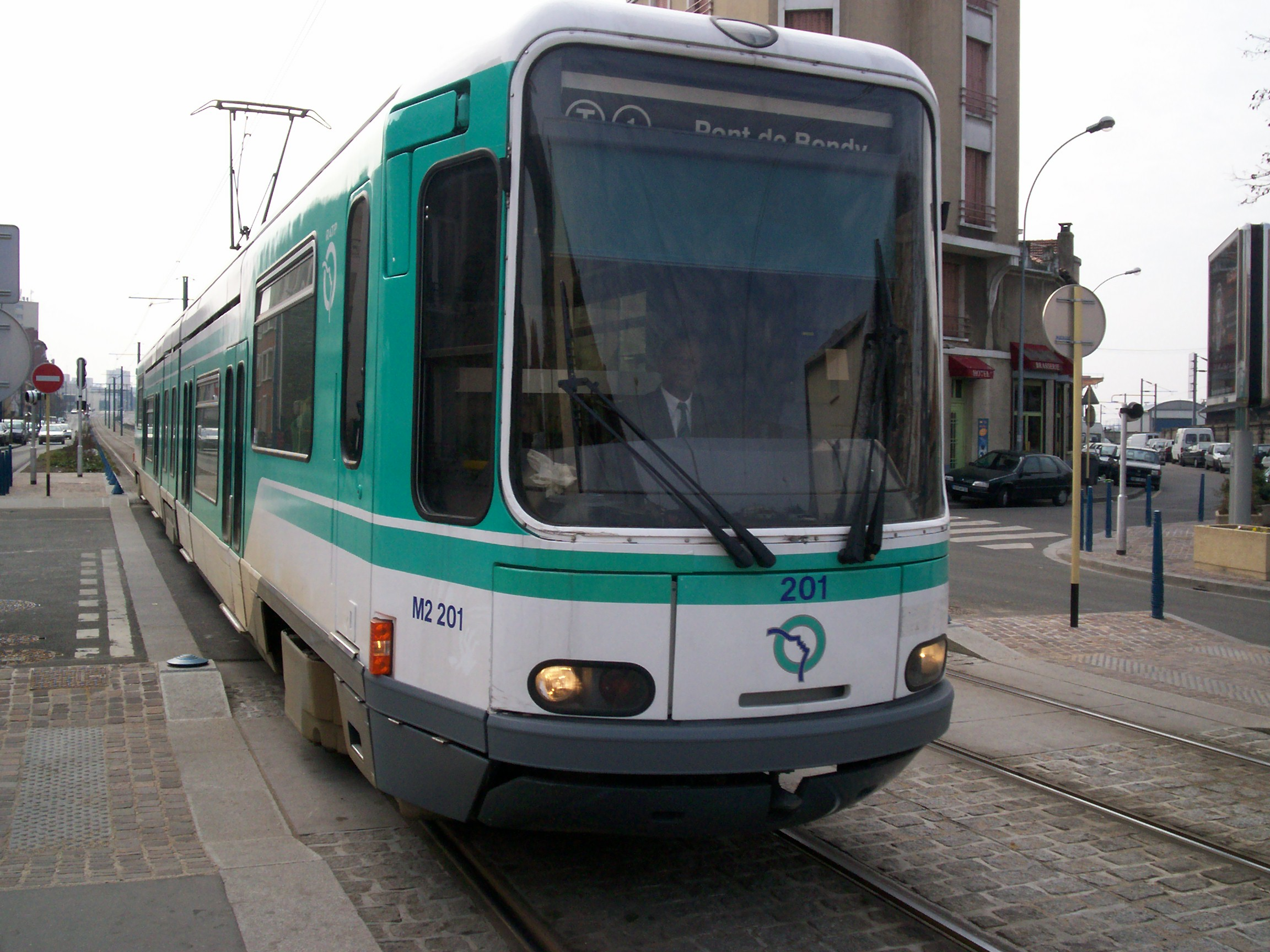 T1 à Petit Noisy